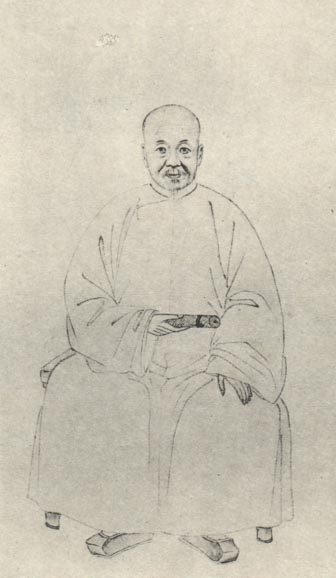 清代学者。Huang Pengnian